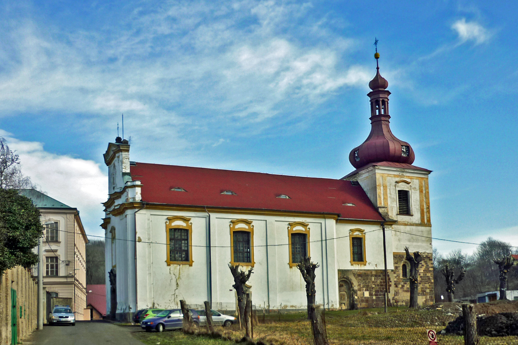 Laurentiuskirche in Kostenblatt (Kostomlaty pod Milešovkou) im Böhmischen Mittelgebirge